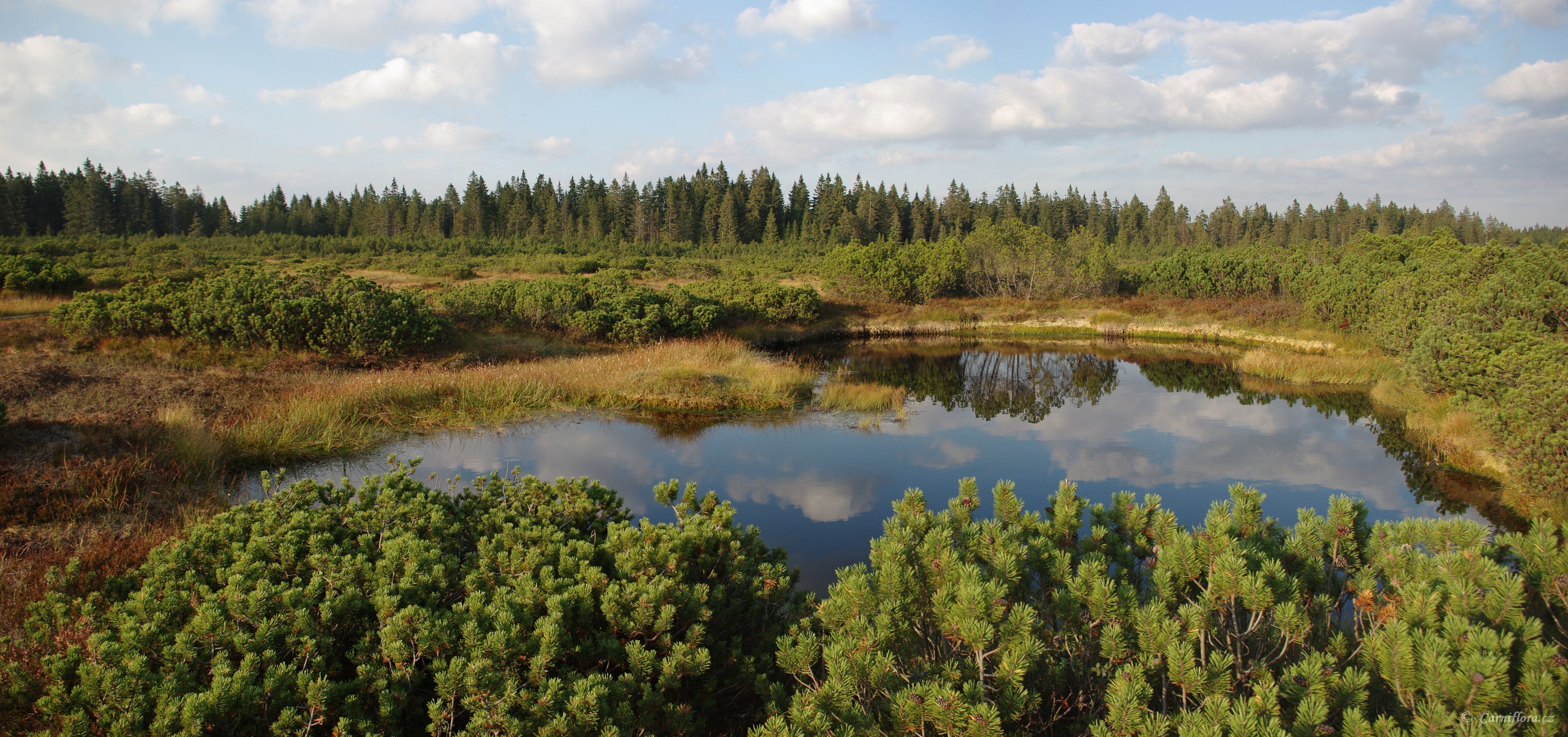 Velký močál, jedno z rašeliných jezer (Blänk) v rozsáhlé NPR Velký močál, lemováno klečí